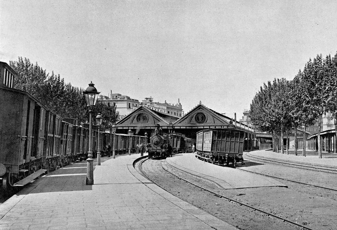 Estació de França (Barcelona)anys 1800. Gentilesa de l'arxiu de Ugo Manzoni